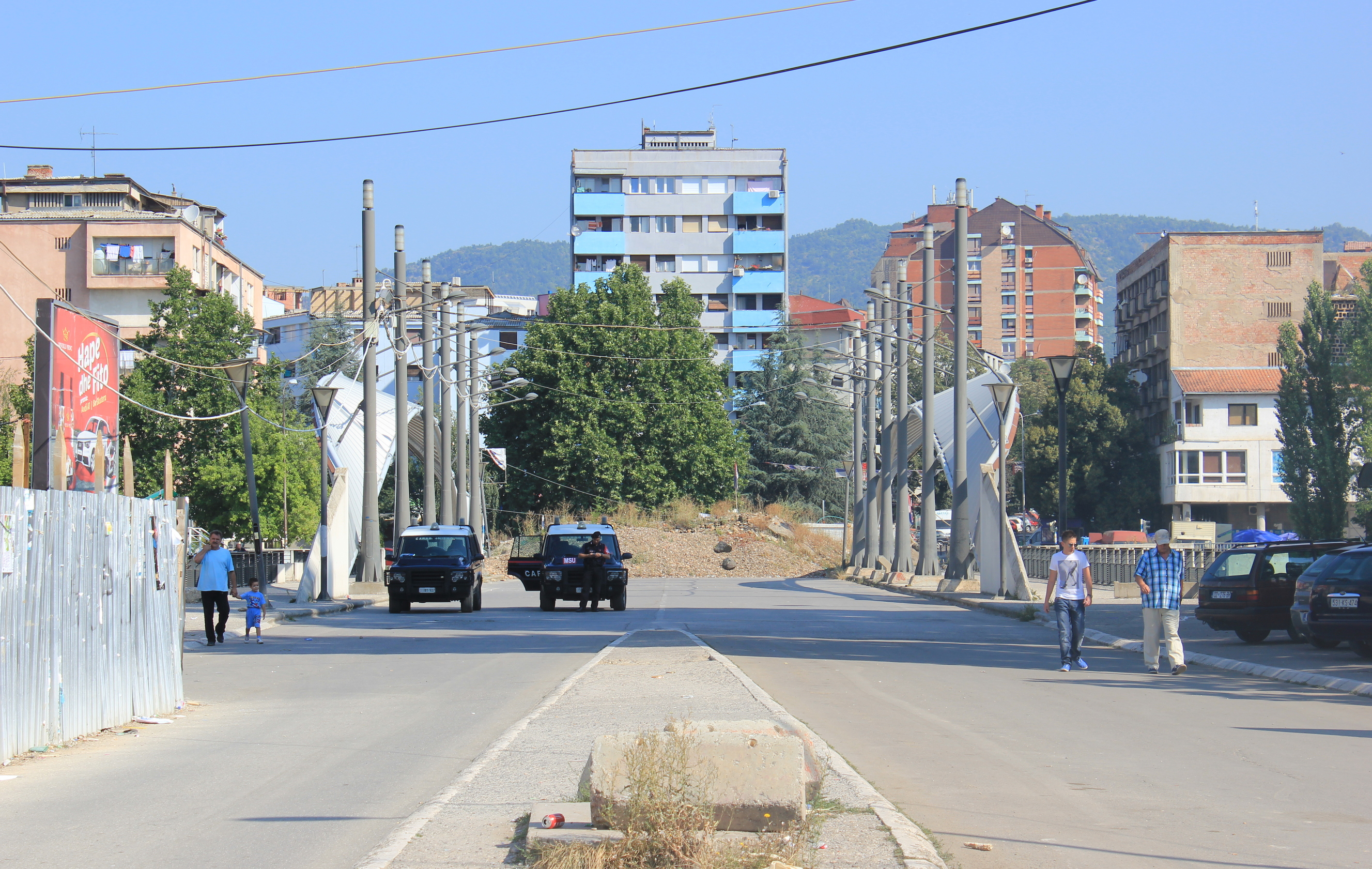 Die Brücke über den Ibar in Mitrovica verbindet den albanischen mit dem serbischen Teil der Stadt (Blick nach Norden).Hornjoserbsce: Móst nad Ibarom w Mitrovicy zwjazuje albanski dźěl města ze serbiskim.